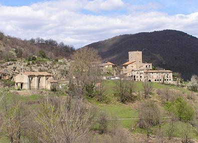 Saint-Roman-de-Codières (chef-lieu)